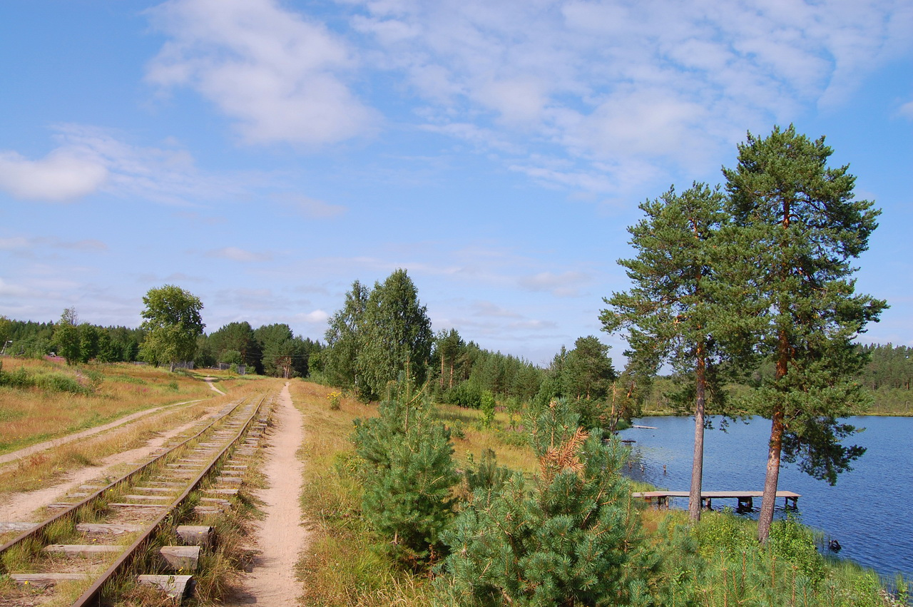 Кудемская УЖД